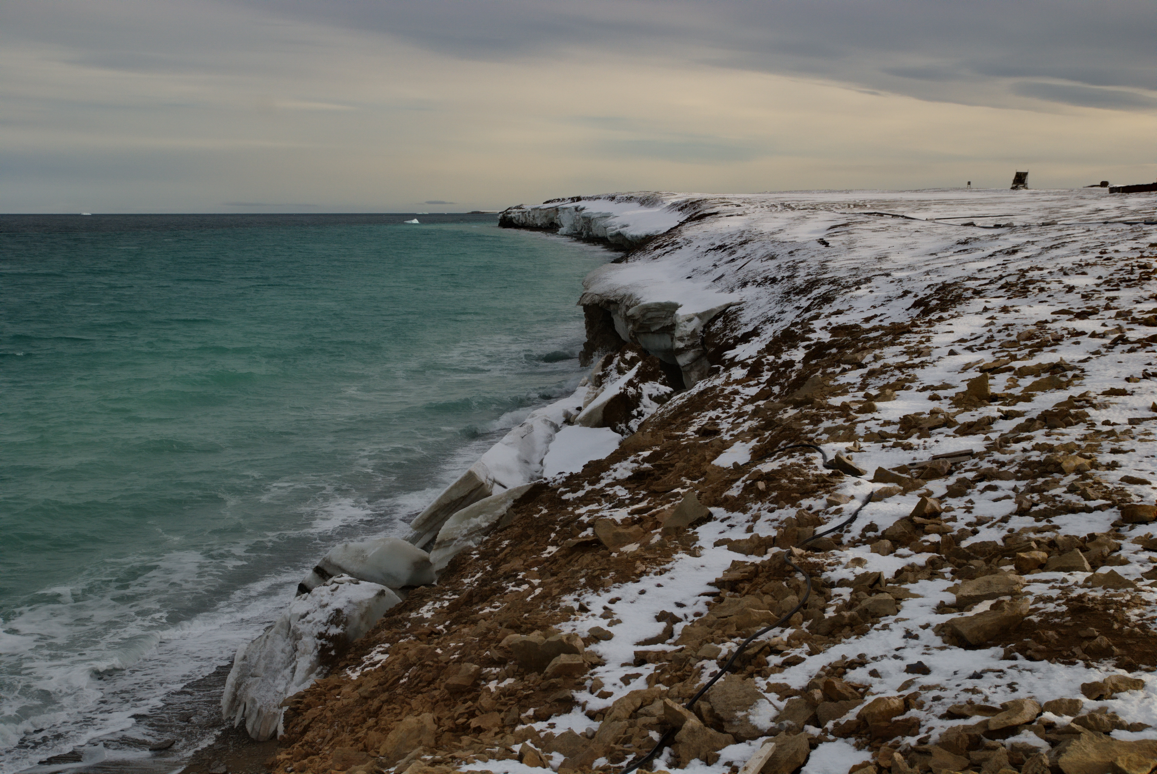 Побережье о. Голомянный в окрестностях полярной станции Coast of the island near the polar station